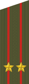 Погоны подполковника сухопутных войск РФ